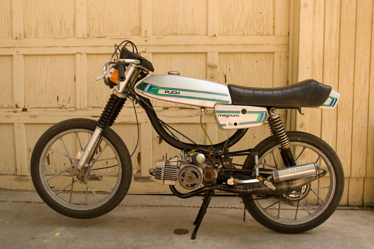 My Magnum